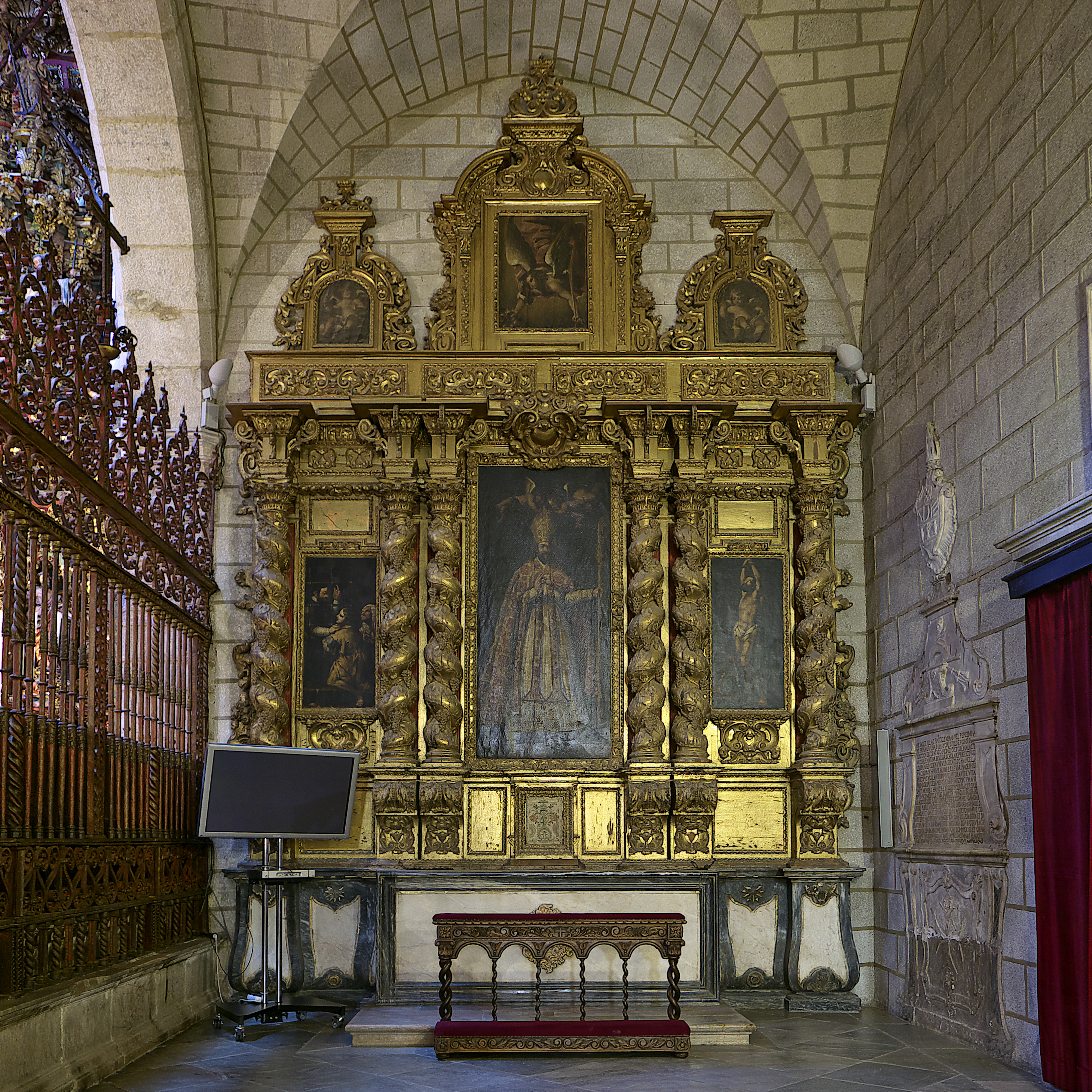 Situada en la cabecera de la nave de la Epístola. Pinturas del siglo XVII y retablo de Alonso Rodríguez Lucas (1697).